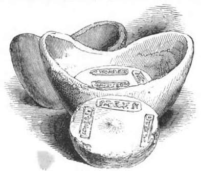 Syceesilber.